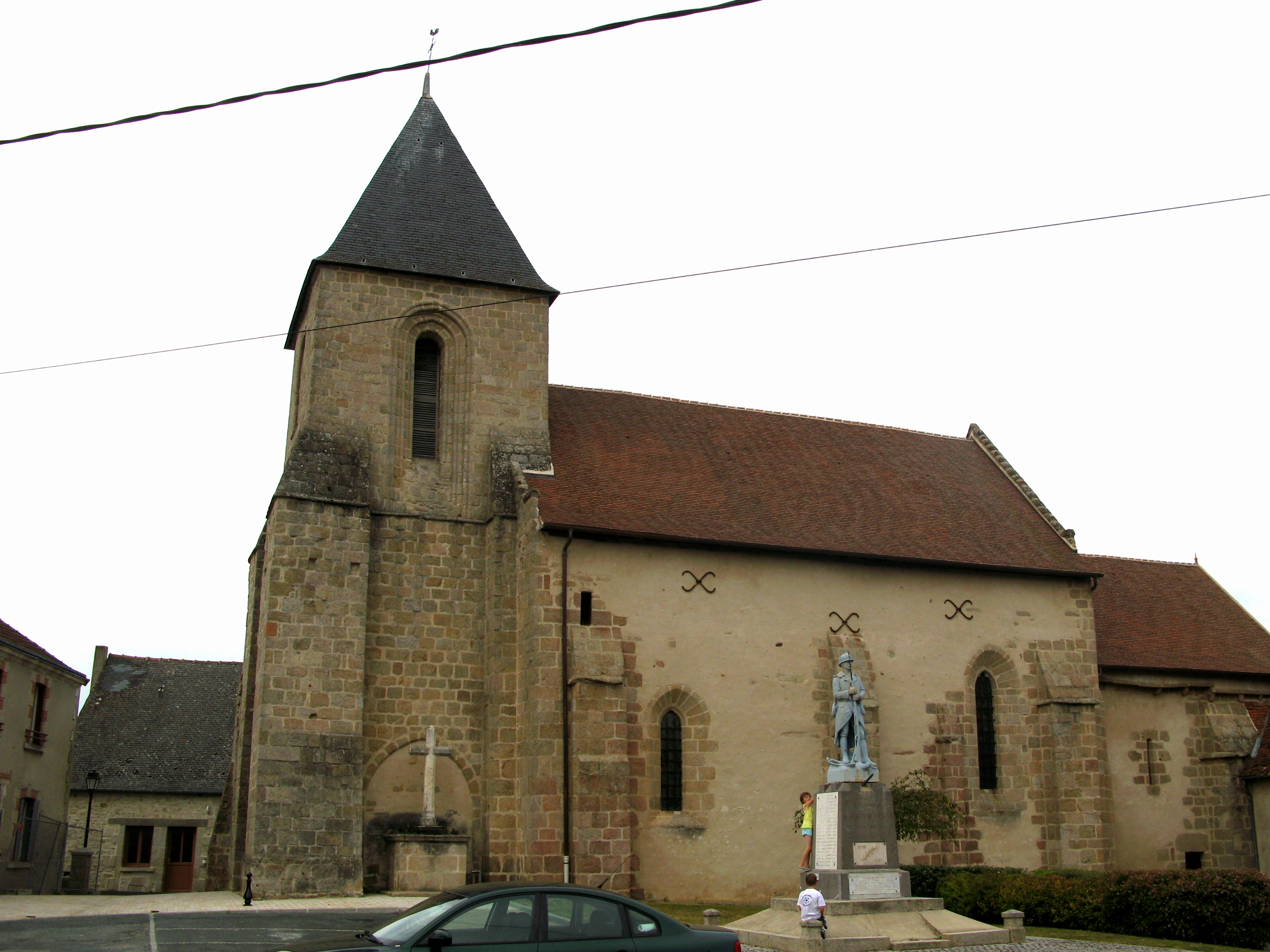 Saint-Agnant-de-Versillat (Creuse, France) - L'église et le monument-aux-morts. . .